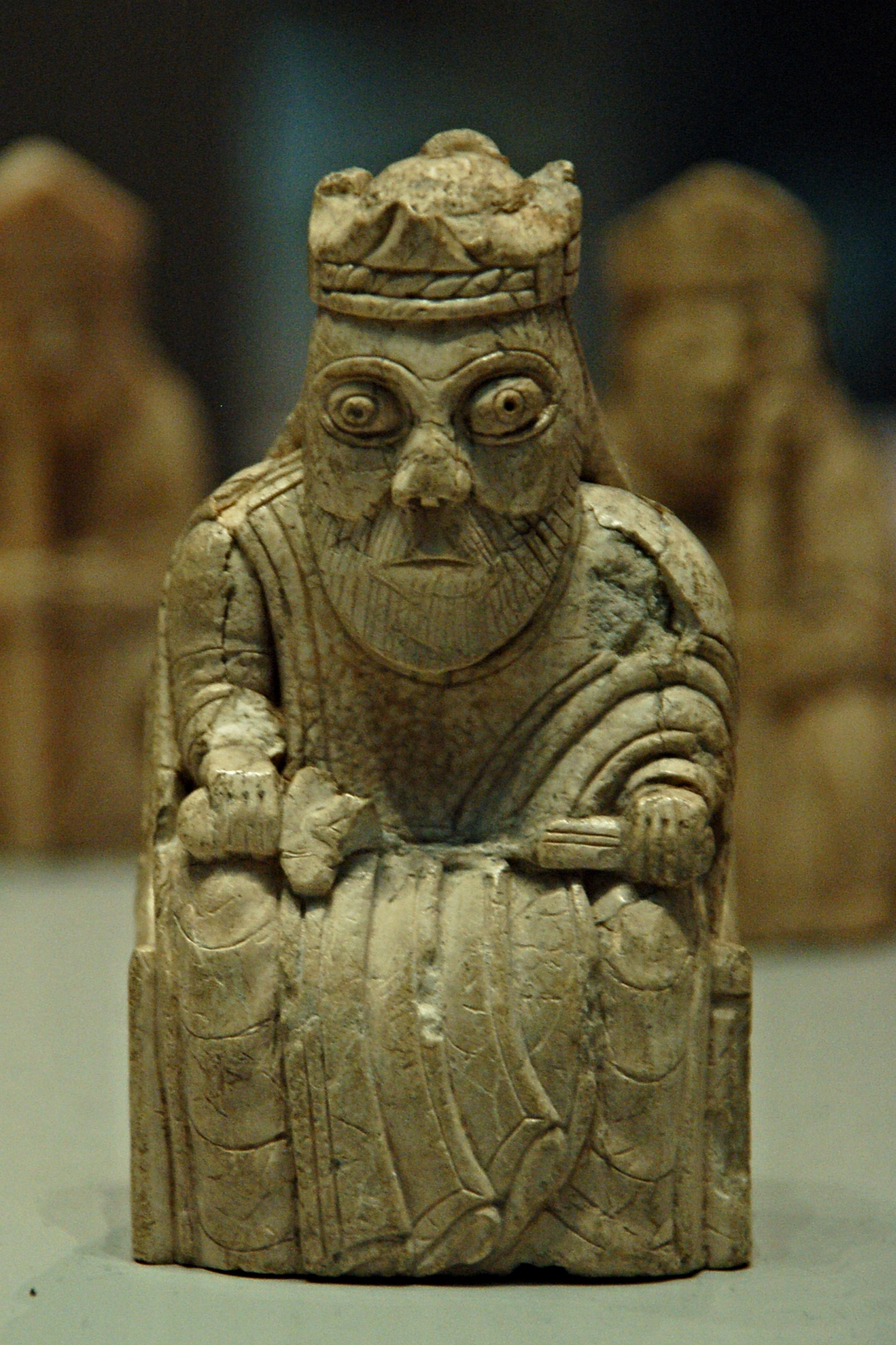 The Lewis chessmen Vers 1150-1200 Salle 40, British Museum